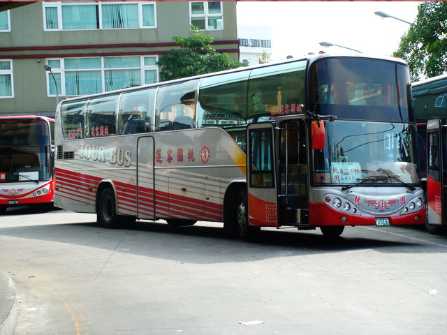 桃園客運2005年日野LRM2PSU大客車450-FT，原為桃客旅行社使用之車輛。